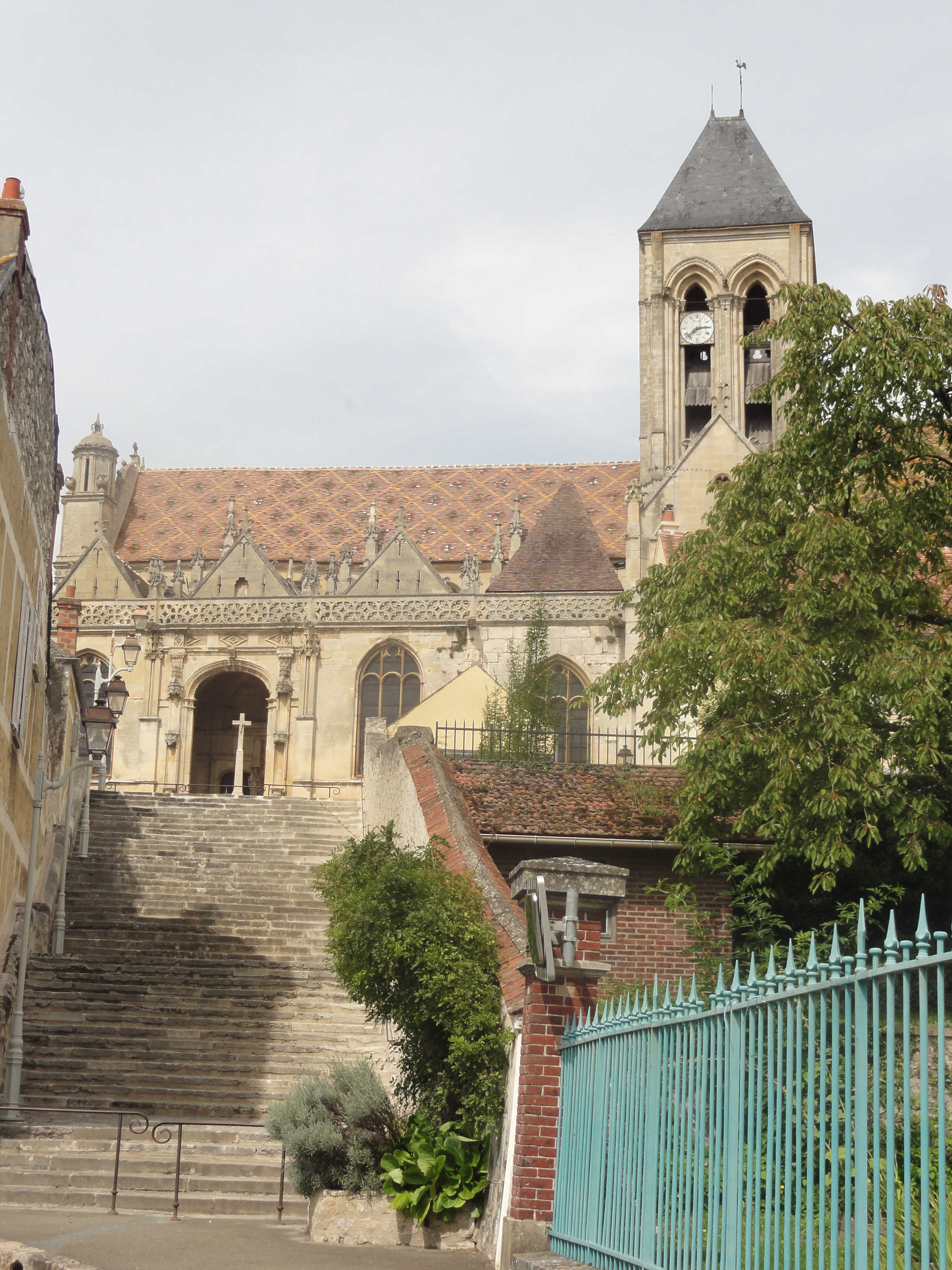 Eglise Notre-Dame et escalier de l'église.